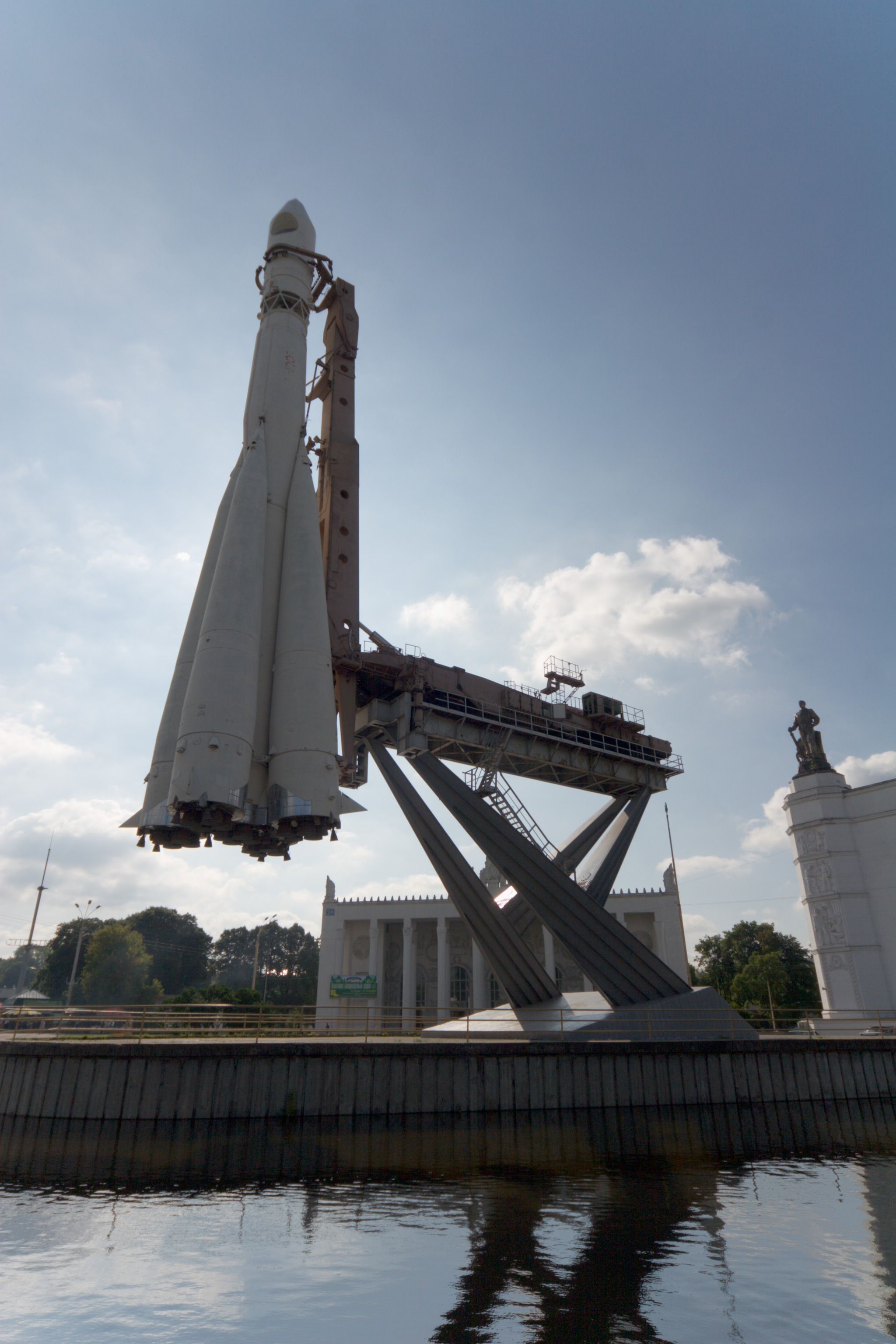 Ракета, аналогичная ракете "Восток", на которой Ю.Гагарин вылетел в космос. Расположена на территории ВВЦ, Москва